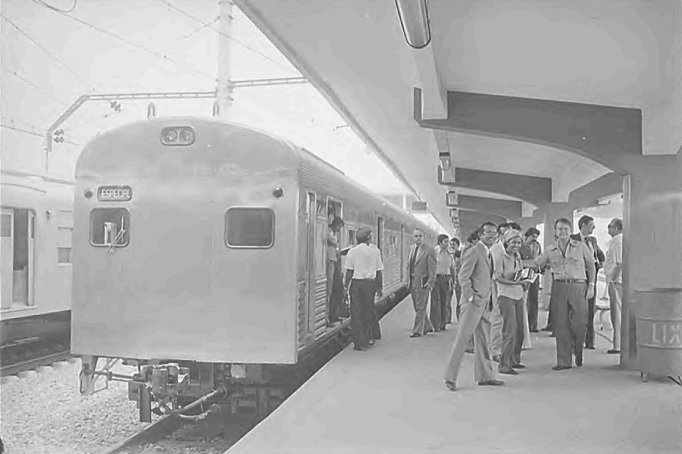 Um dos trens Série 431 testados na linha Saracuruna/Leopoldina do trem de subúrbios da Rede Ferroviária Federal, Rio de Janeiro. Imagem do Arquivo Nacional do Brasil, código BR RJANRIO EH 0 FOT EVE 13643 d0020de0020.